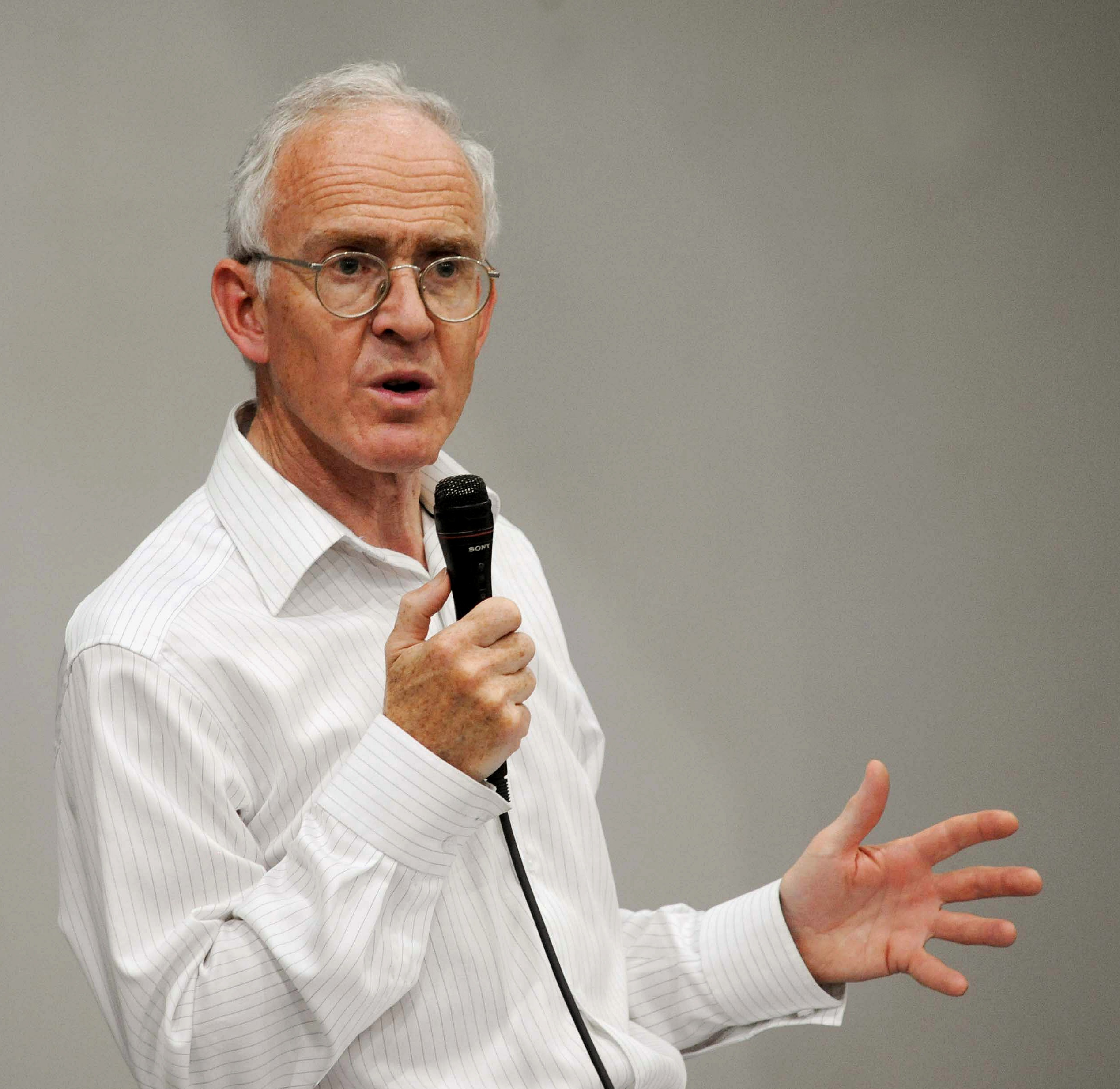 Palestra de Randal Keynes, tataraneto de Charles Darwin, na 61ª reunião anual da Sociedade Brasileira para o Progresso da Ciência, em Manuas.